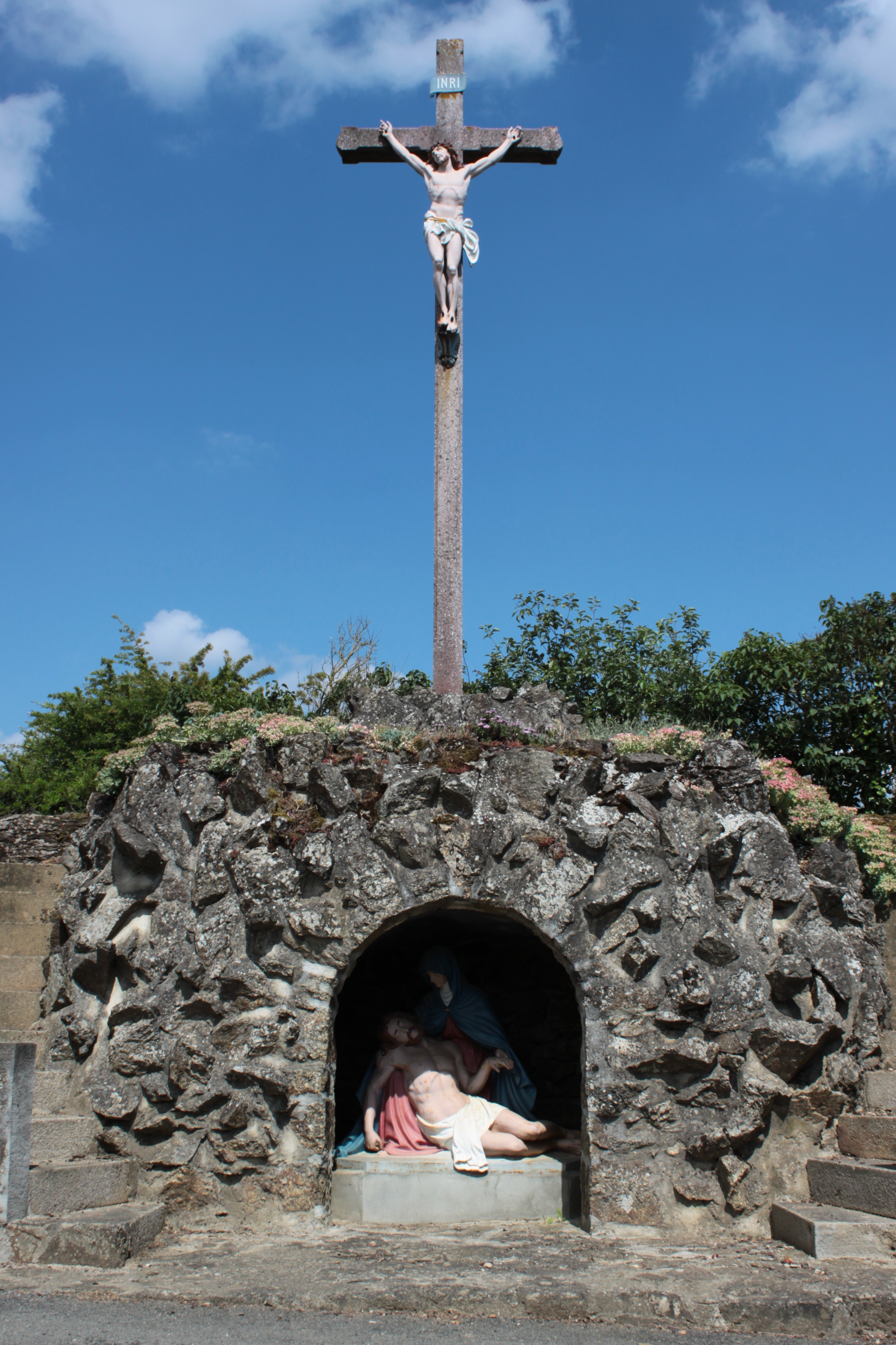 Croix de la mairie, Fr-49-La Chapelle-Saint-Florent.